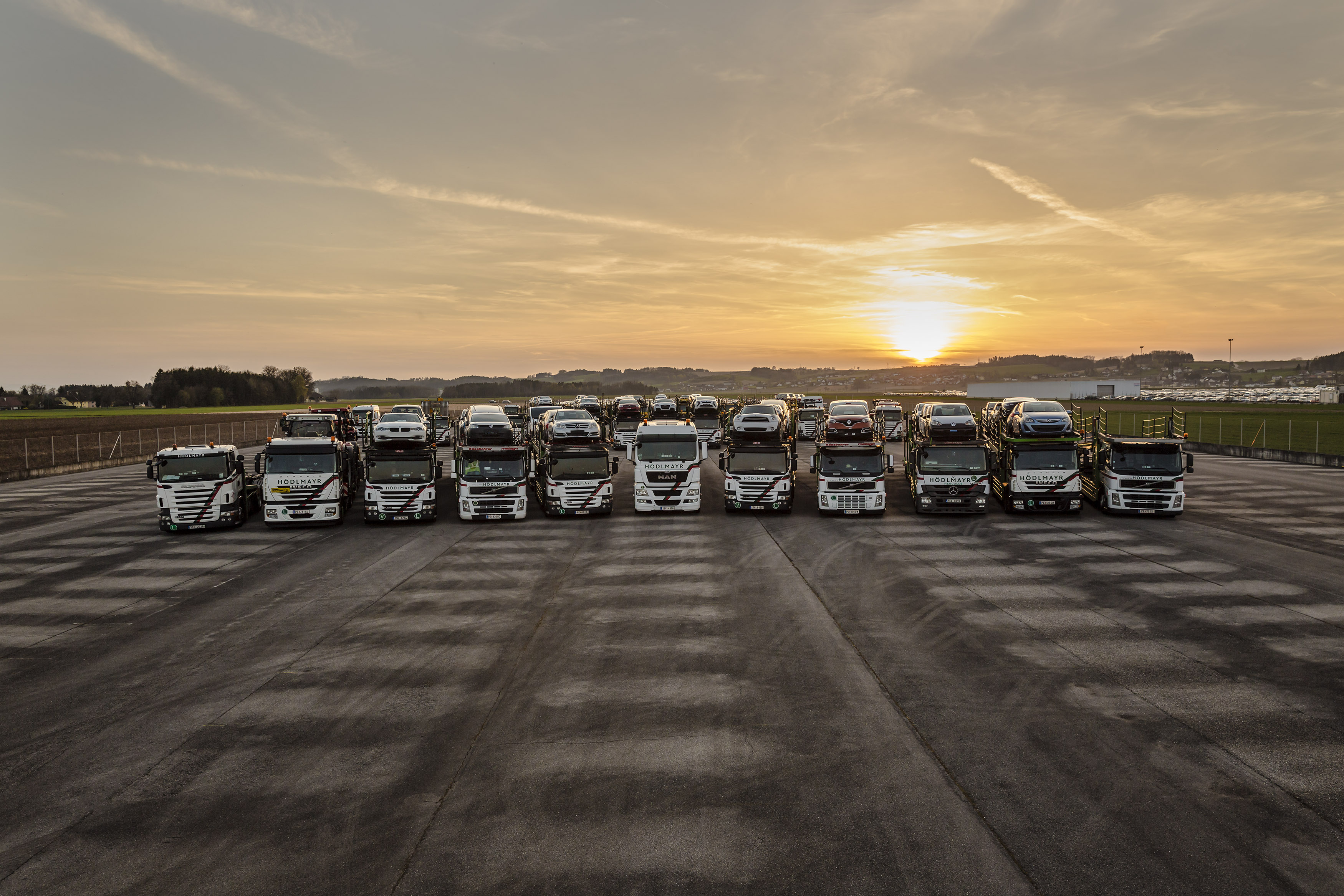 Die strategische Vision lautet: vom Logistik- zum Automotiv- zum Mobilitäts-Experten, um mittel- bis langfristig auf jedem Markt für die entscheidenden Wettbewerbsvorteile zu sorgen.